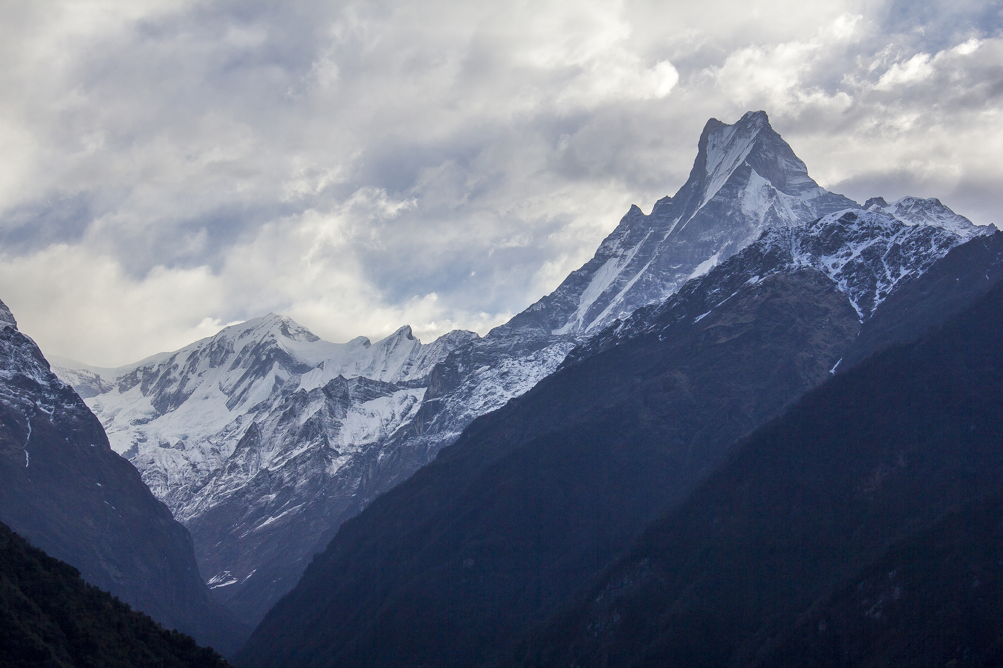 नेपाली: नेपालको कास्की जिल्लामा अवस्थित छोमरोङवाट देखिएको माछापुच्छ्रे हिमालको एक मनोरम दृश्य । माछाको पुच्छर जस्तो हुनाले नै यो हिमालको नाम माछापुच्छ्रे रहेको हो । यसलाई अङ्ग्रेजीमा फिस टेल पनि भनिन्छ । उचाई: ६,९९३ मिटर। यो हिमाललाई मानिसहरूले भगवान शिवको पवित्र स्थान मानेर श्रद्धा गर्छन त्यसैले यो हिमालमाथि आरोहण गर्ने अनुमति छैन ।